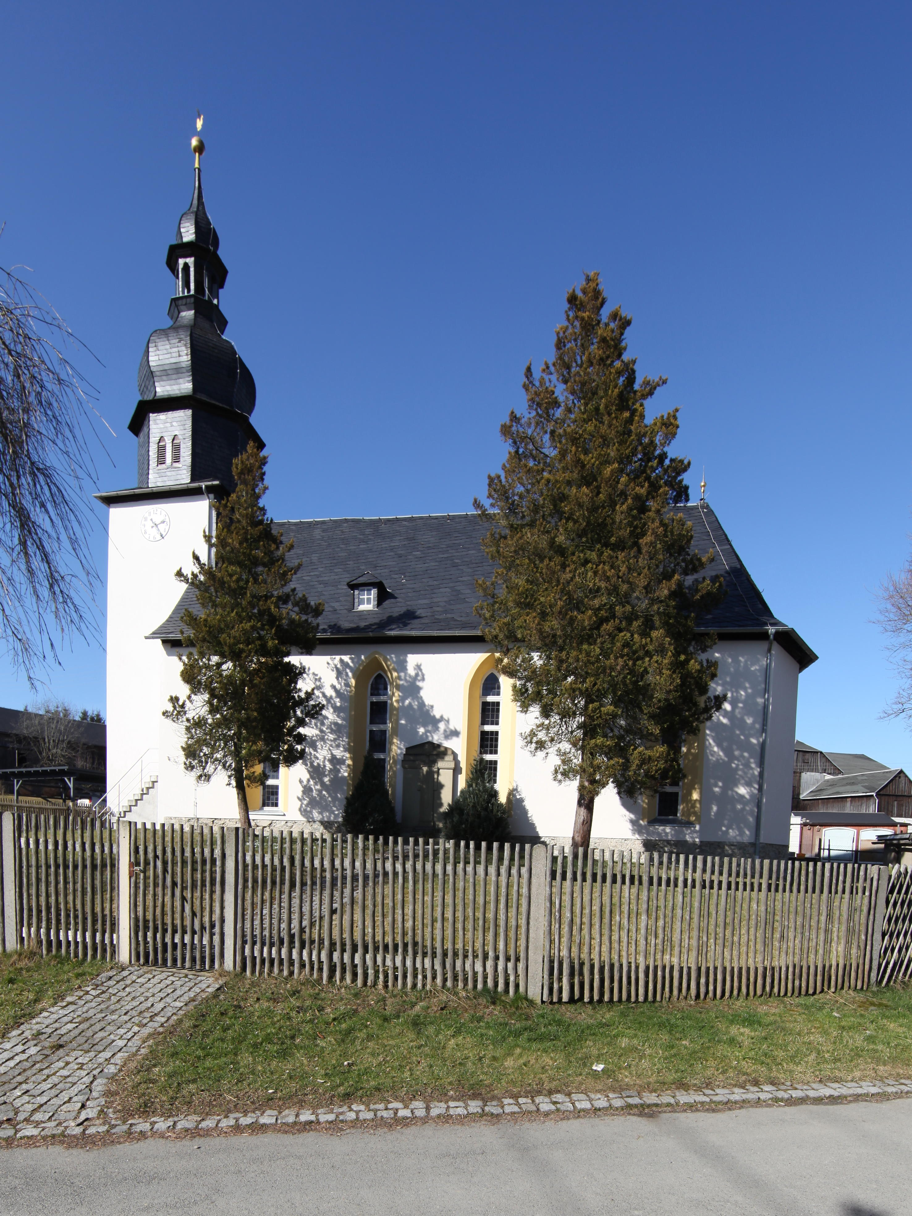 Frössen-Ev-Kirche